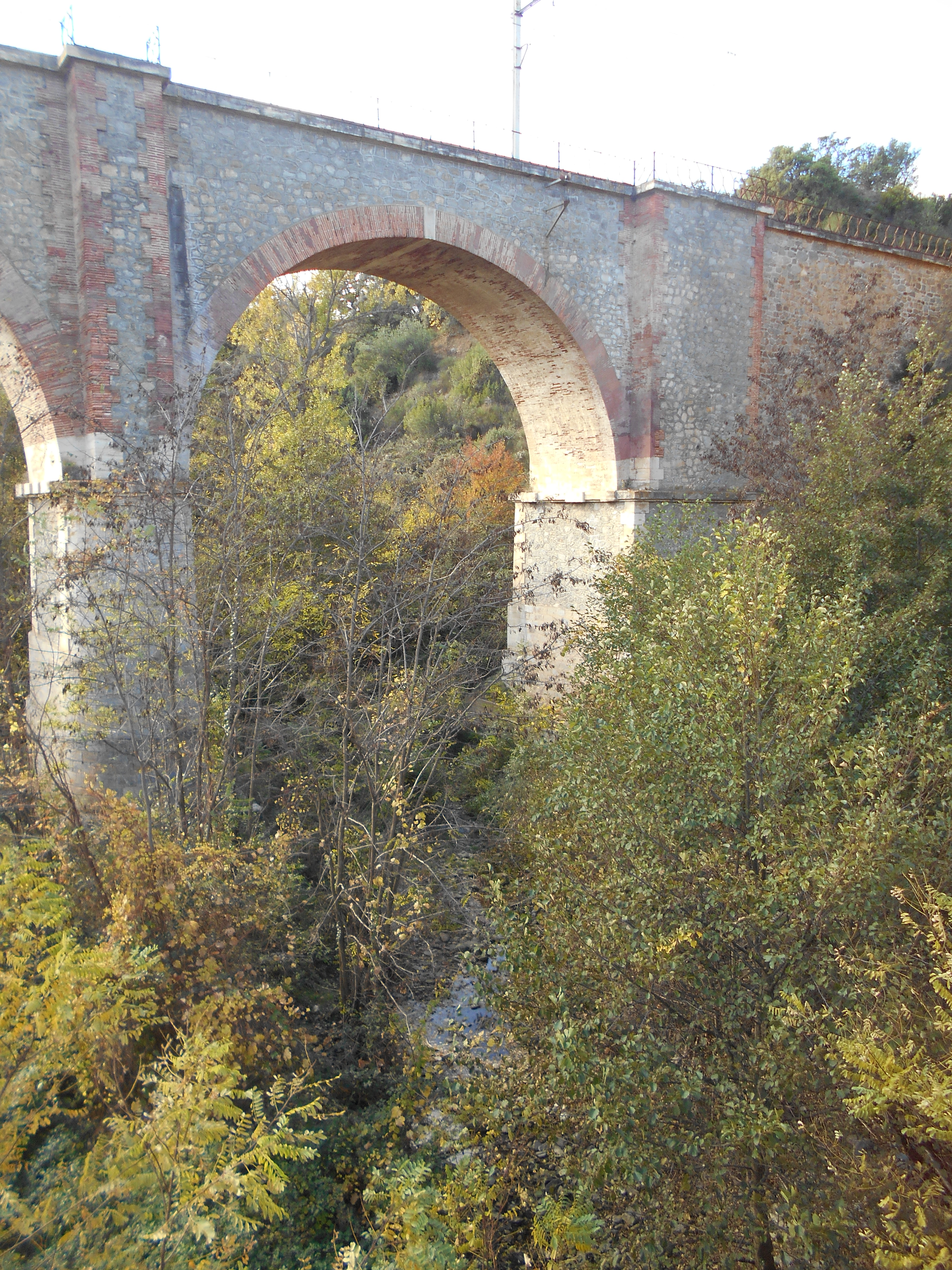 El Riufagès, a Rodès